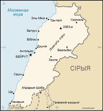 Карта Лівана